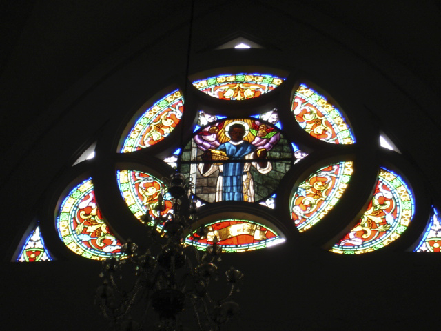 Catedral de San Pedro, Cali, Colombia